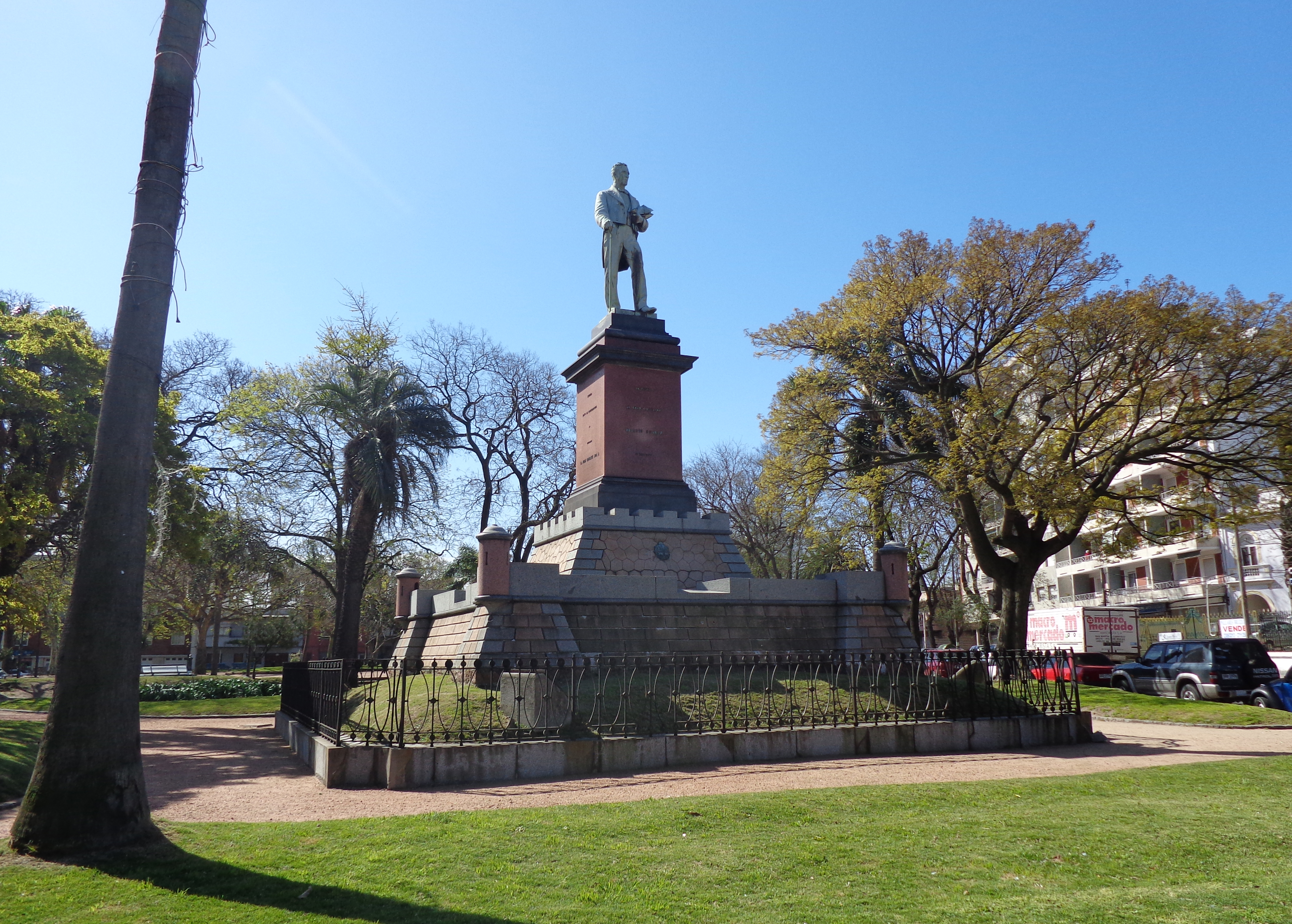 Joaquín Suárez. Ubicada en el departamento de Montevideo